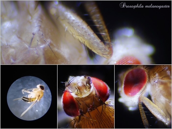 Wywilżnia pod mikroskopem, detal